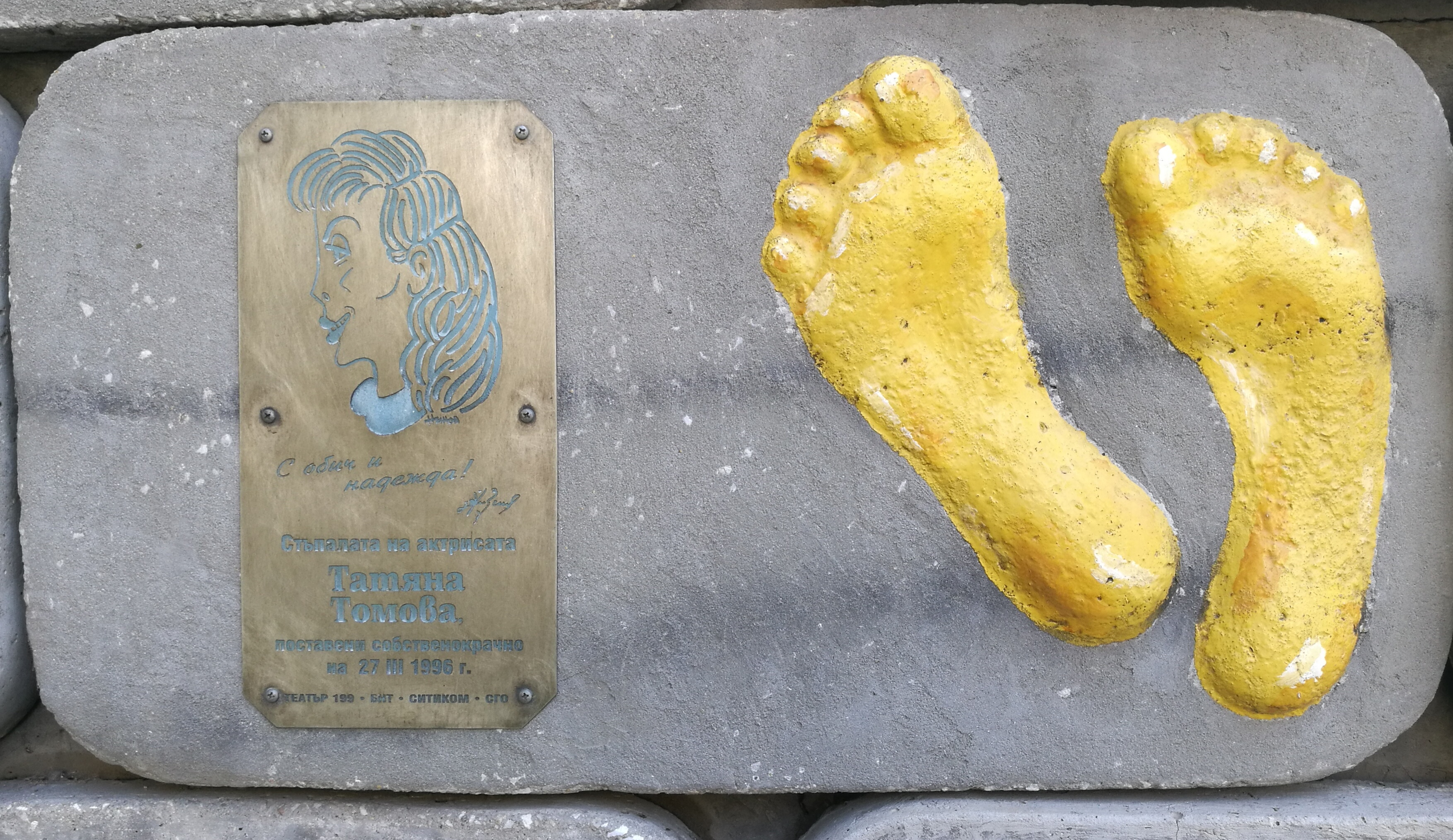 Стената на славата пред Театър 199 - пано с отпечатъци, послание и шарж на Татяна Томова.